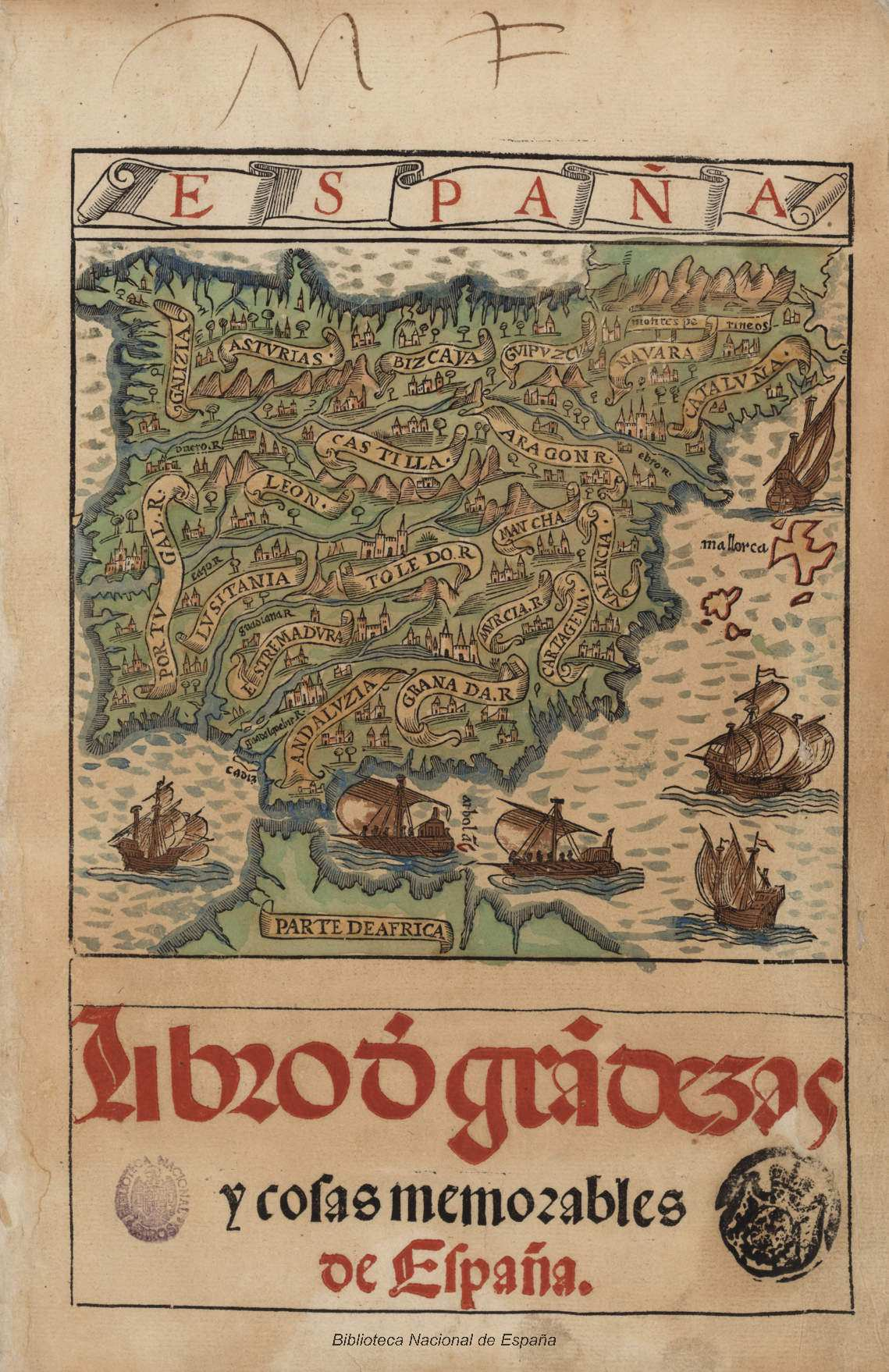 Libro de grandezas y cosas memorables de España. Agora de nuevo fecho y copilado por el Maestro Pedro de Medina ... Autor: Medina, Pedro de (1493?-1567?) Fecha: 1548 Datos de edición: [Seuilla] En casa de Dominico d[e] Robertis (Robertis, Dominico de)